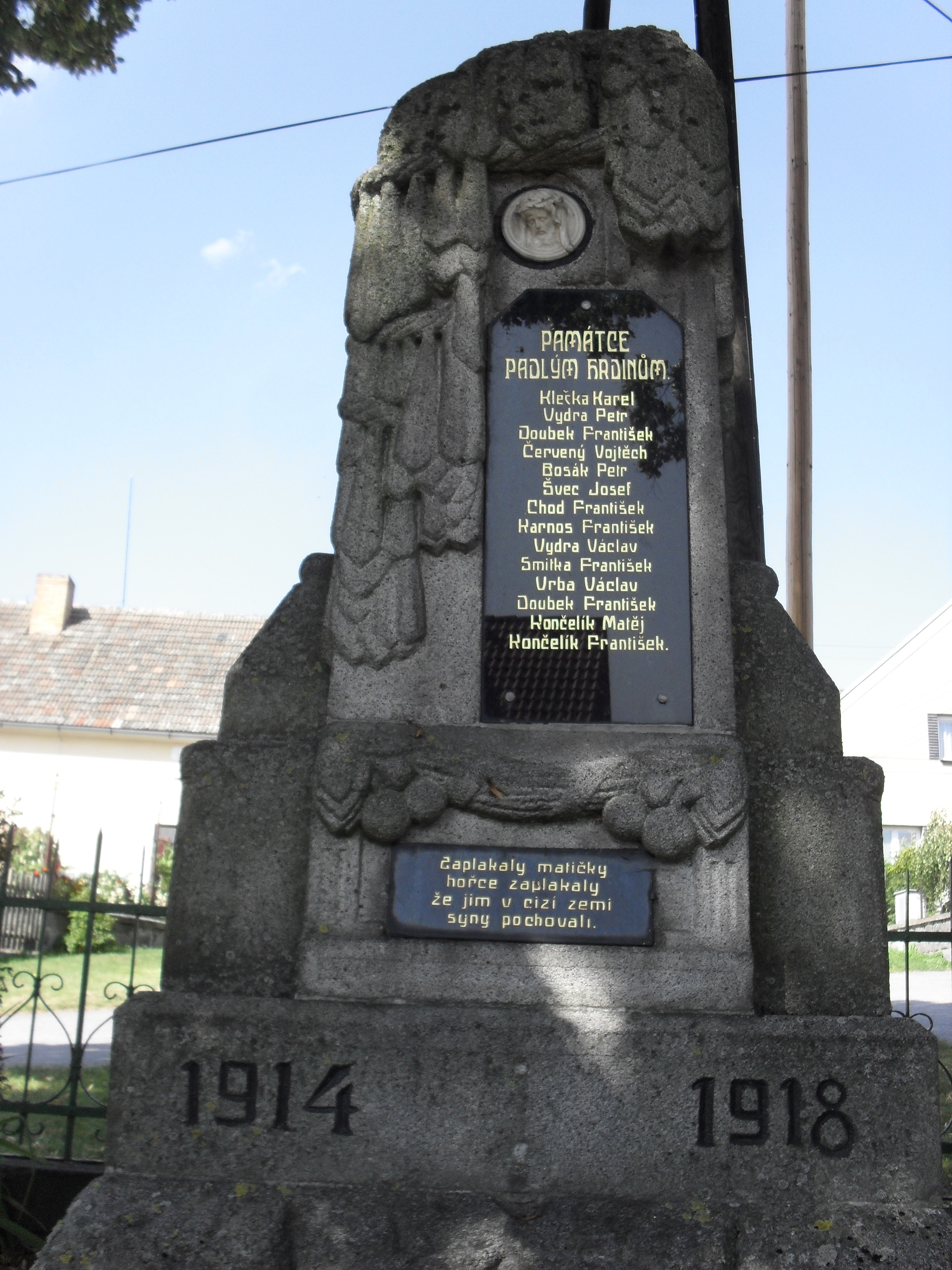 Fotografie pořízena v obci Čečelovice.